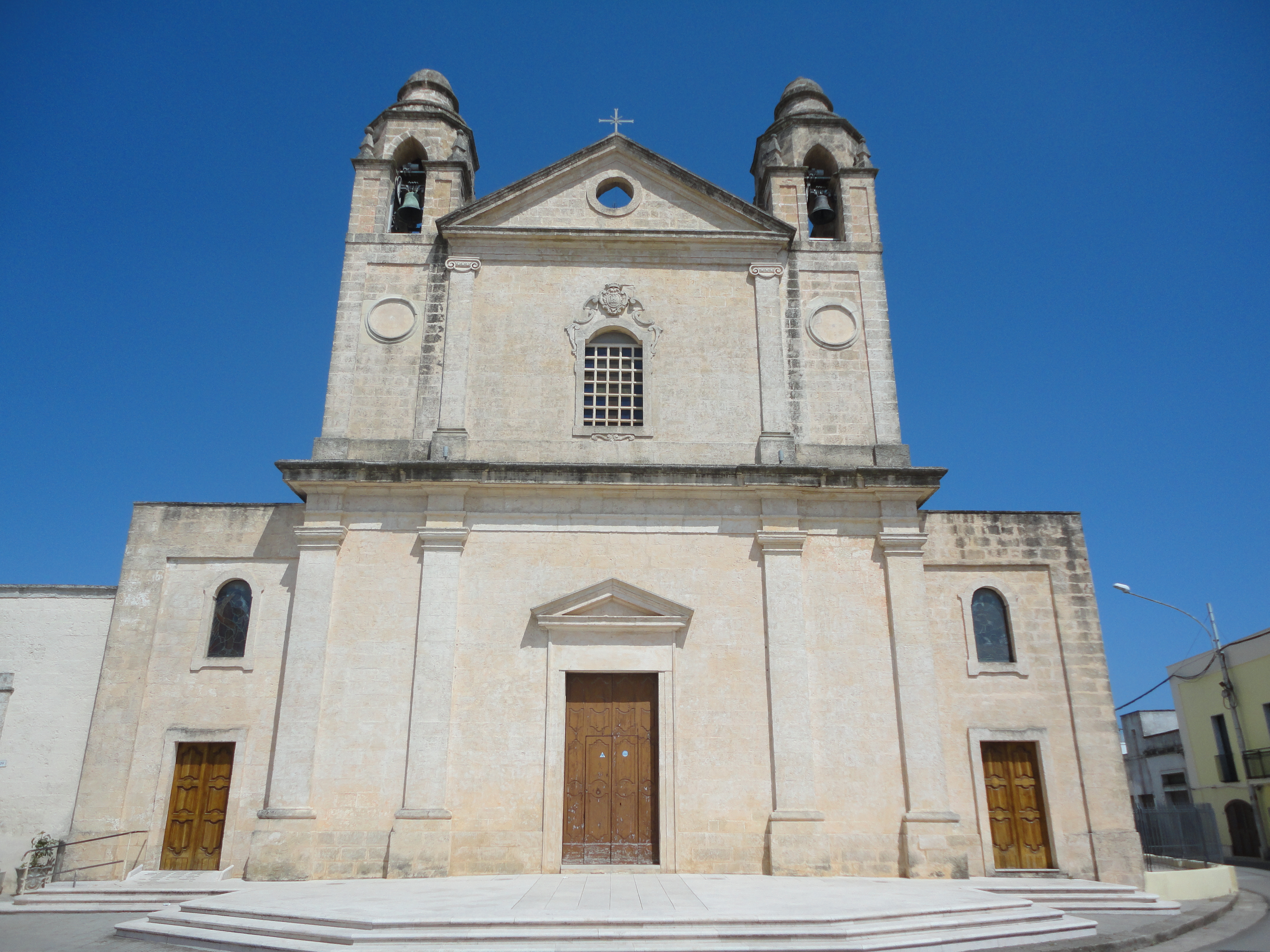 Chiesa Santa Maria delle Grazie Depressa, Lecce